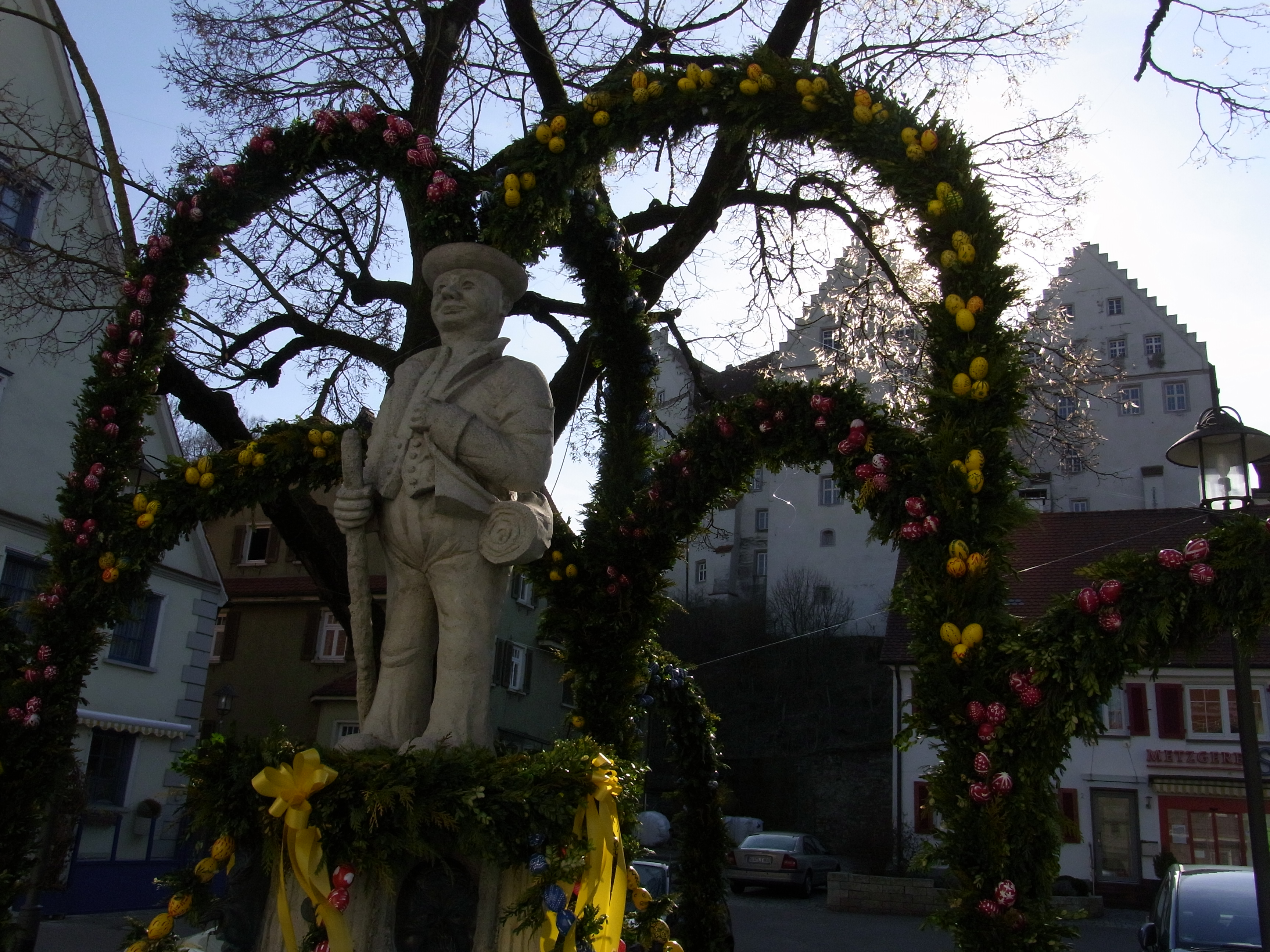 Scheer: Kondebrunnen mit Schloss Scheer